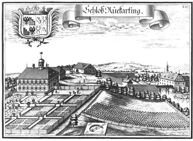 Schloss_Ruckerting_-_Riegerting_nach_einem Kupferstich von Michael Wening